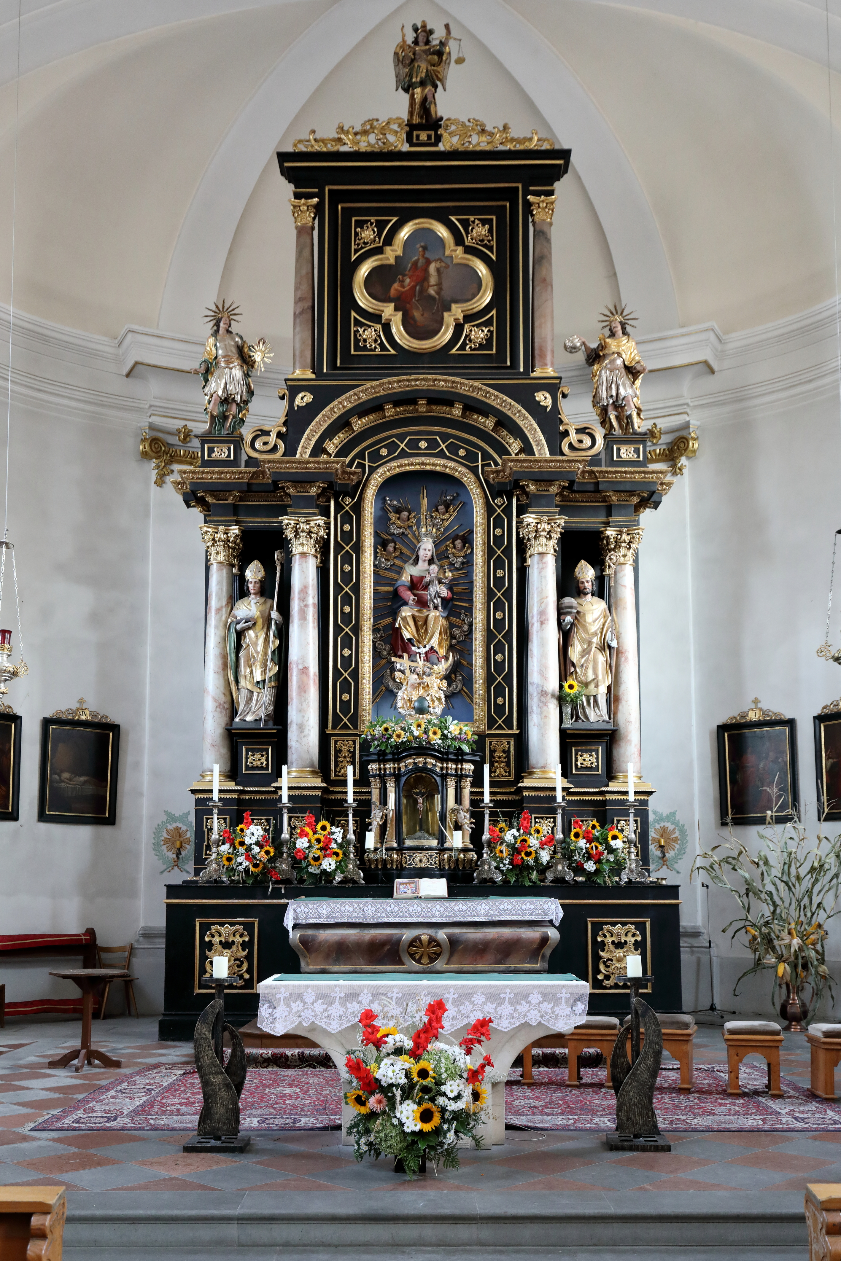 Hochalter der röm.-kath. Pfarrkirche hl. Martin in der Salzburger Gemeinde Eugendorf.